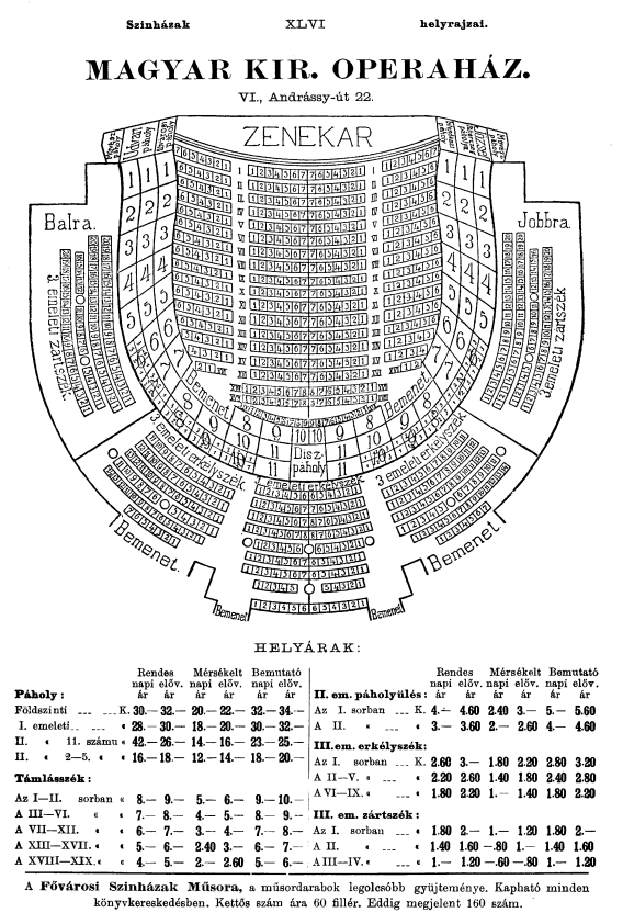 Operaház nézőtér vázlata az 1907. évi budapesti cím- és lakásjegyzékben